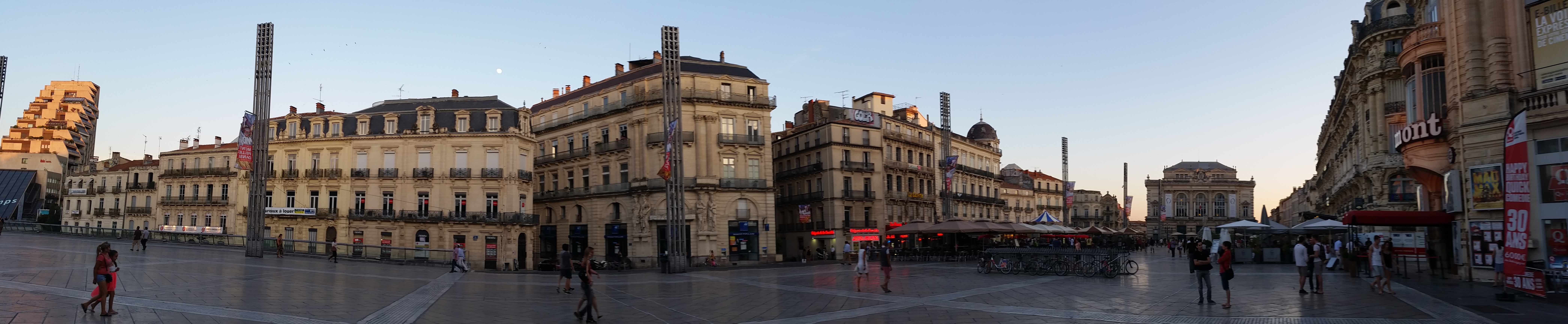 Montpellier - Place de la Comédie